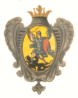 Герб Архангелогородского полка из Знаменного гербовника